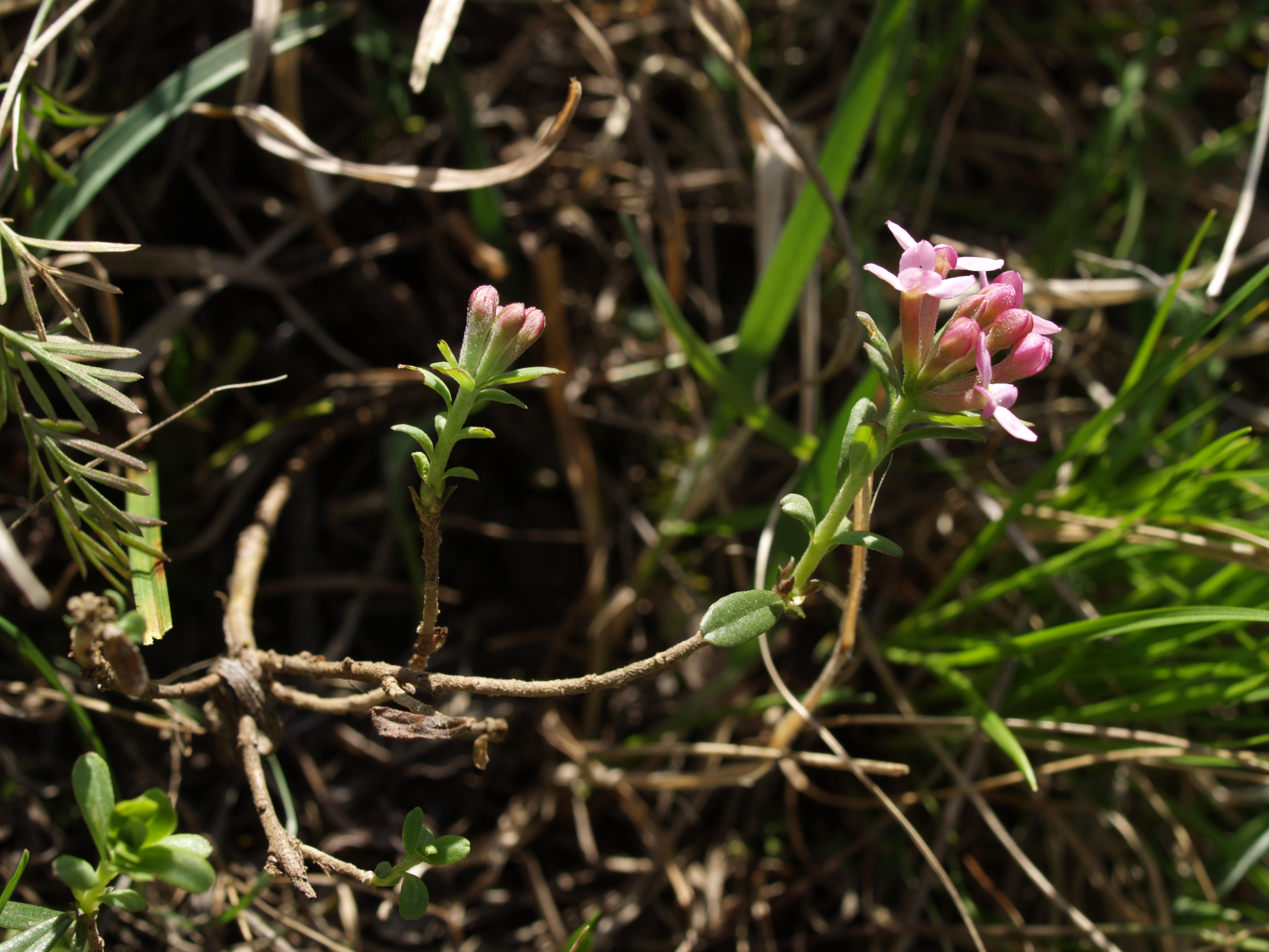 Špidláky (přírodní rezervace) - brzké jaro - Daphne cneorum L., lýkovec vonný - status ohrožení v ČR: C1 (kriticky ohrožený)